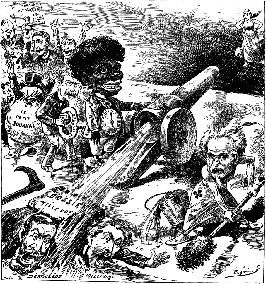 "Effet contraire. Le dernier coup de canon de la Boulange." (Caricature sur l'affaire Norton).